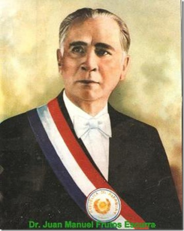 Presidente Py